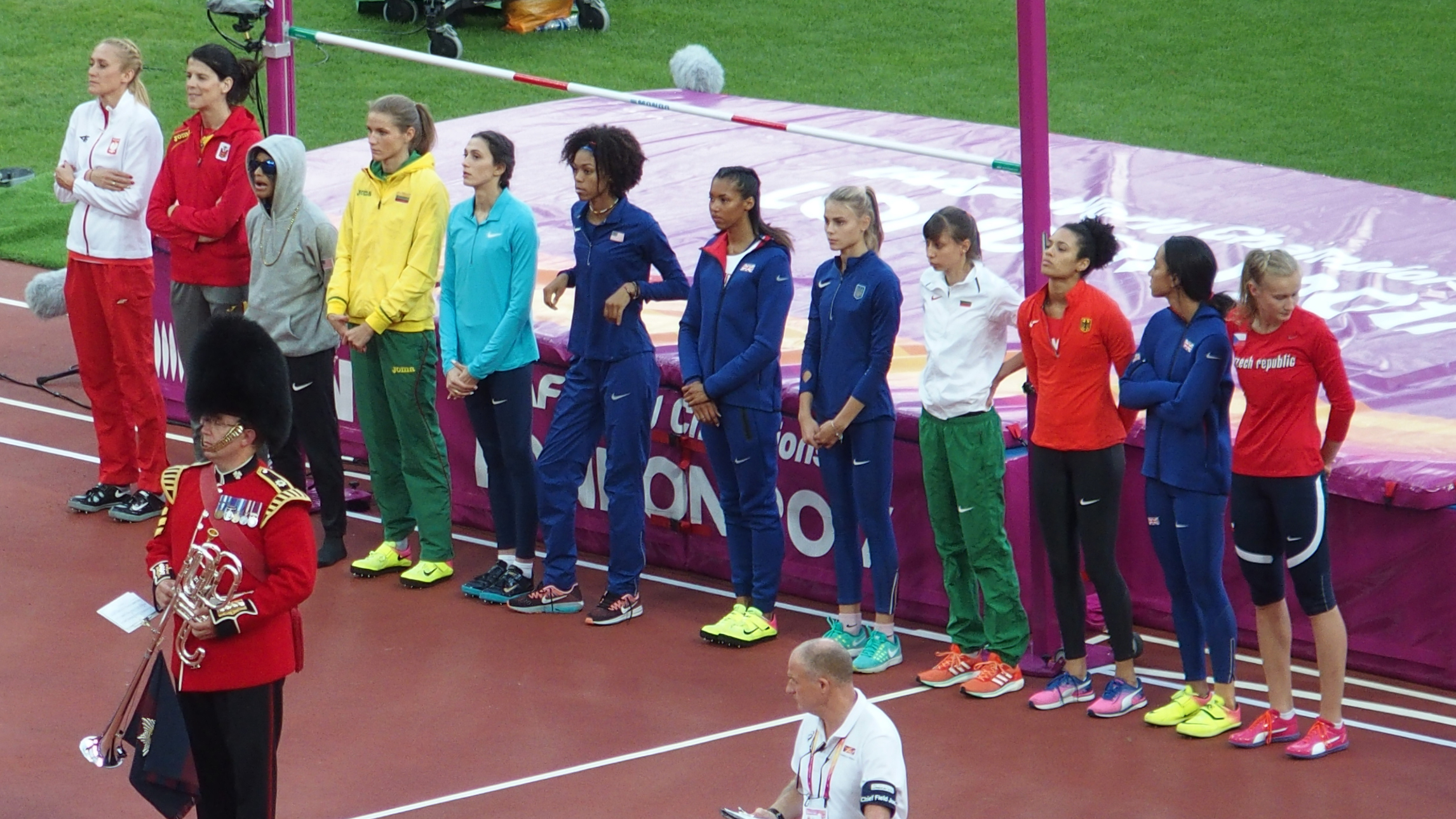 Saut en hauteur, présentation finale. De gauche à droite : Kamila Lićwinko, Ruth Beitia, Inika McPherson, Airinė Palšytė, Mariya Lasitskene, Vashti Cunningham, Morgan Lake, Yuliya Levchenko, Mirela Demireva, Marie-Laurence Jungfleisch, Katarina Johnson-Thompson et Michaela Hrubá